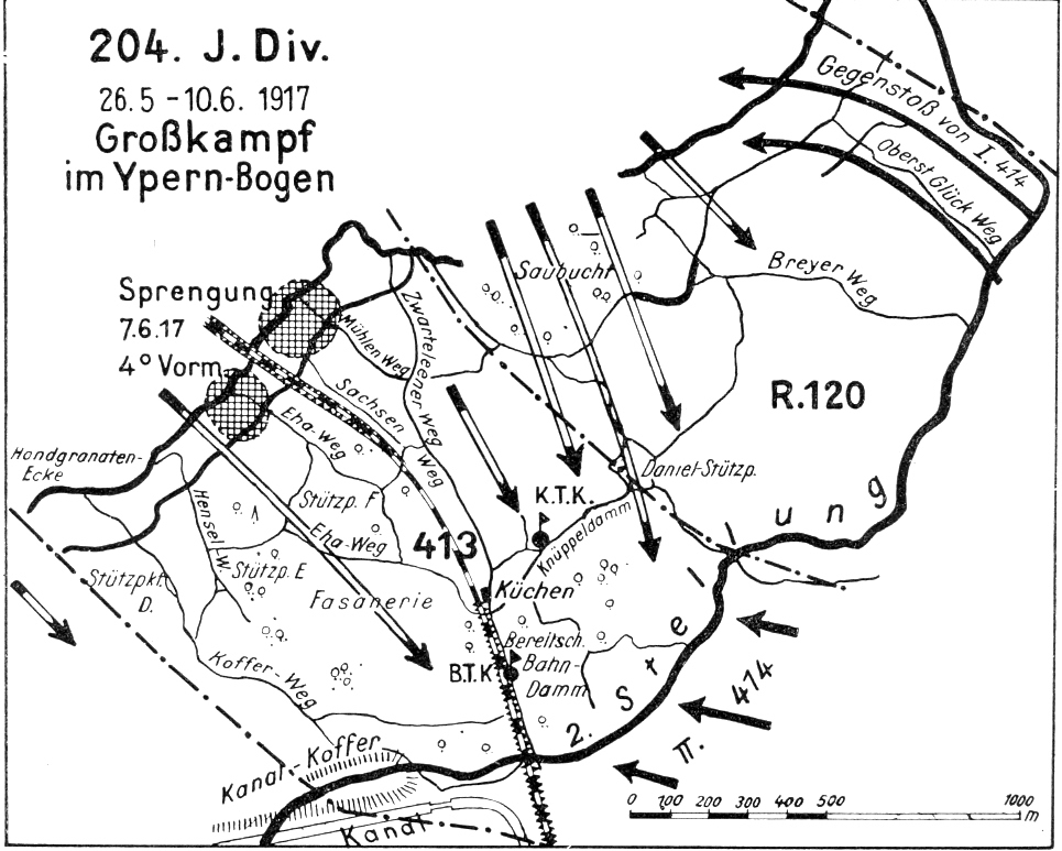 Karte: 240. Inf.Div. 26.5 – 10.6. 1917 Großkampf im Ypernbogen